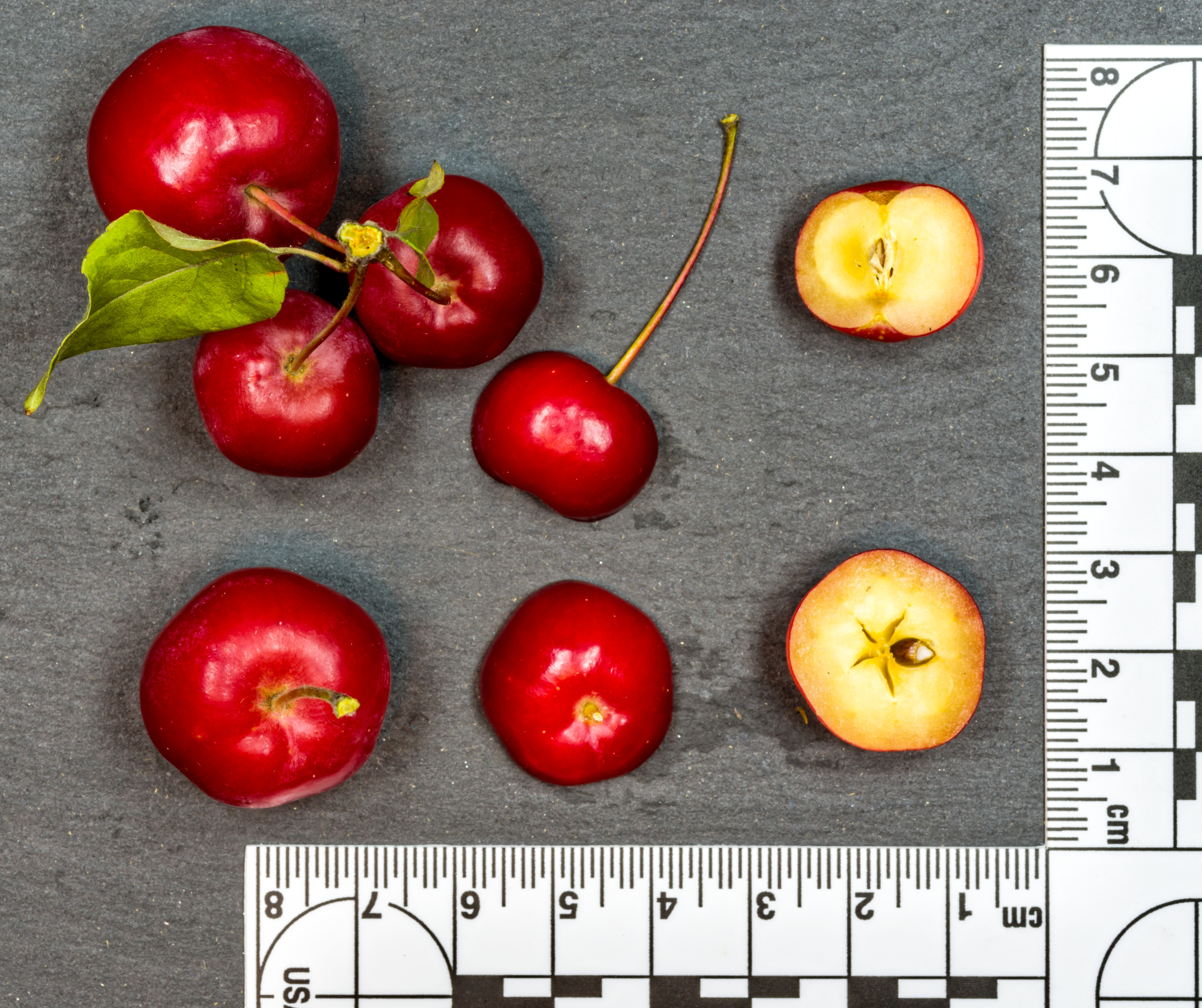 Apfelsorte: Malus FloribundaJapanischer Wildapfel, Korallenstrauch